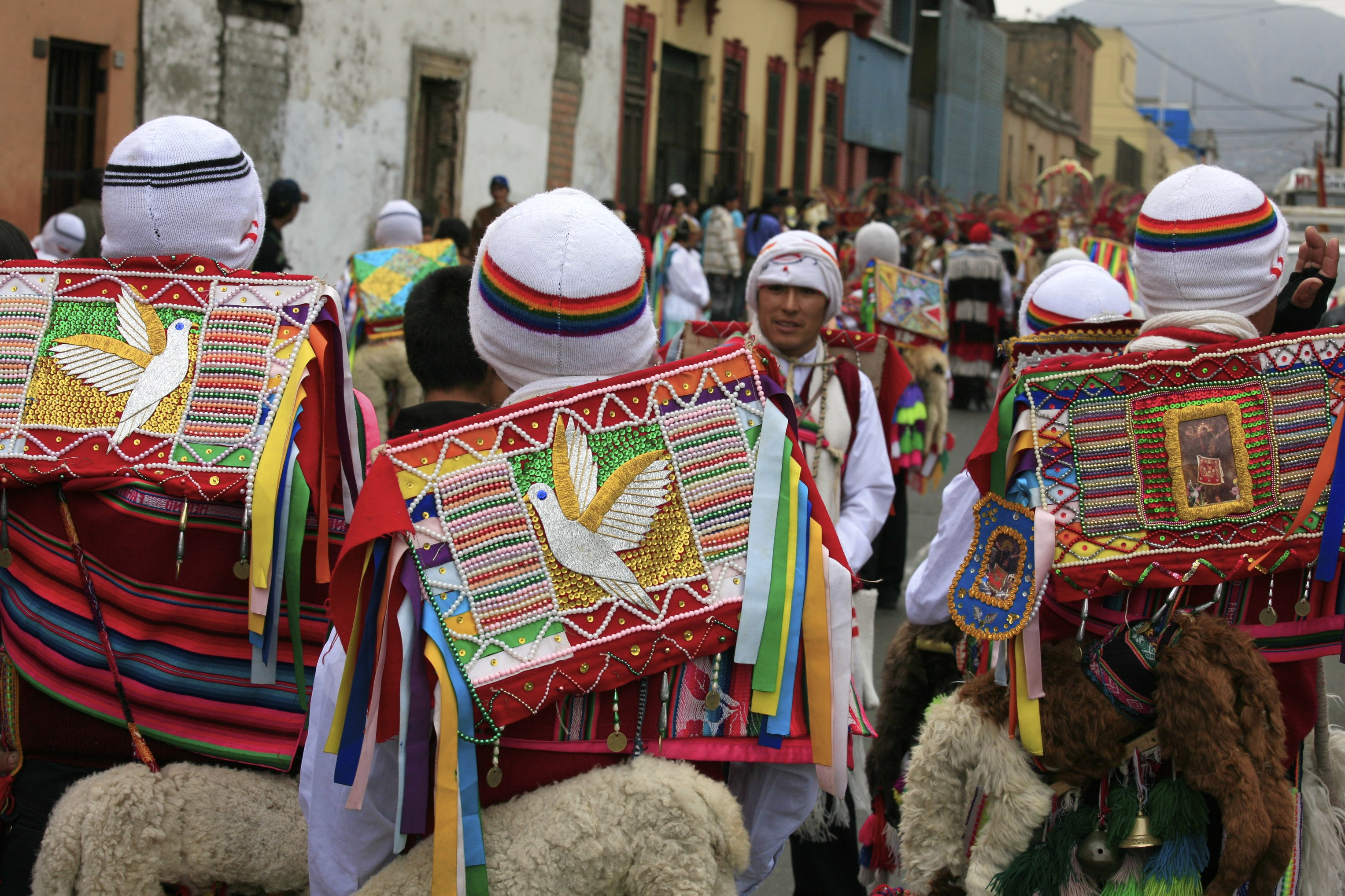 Festive Costume